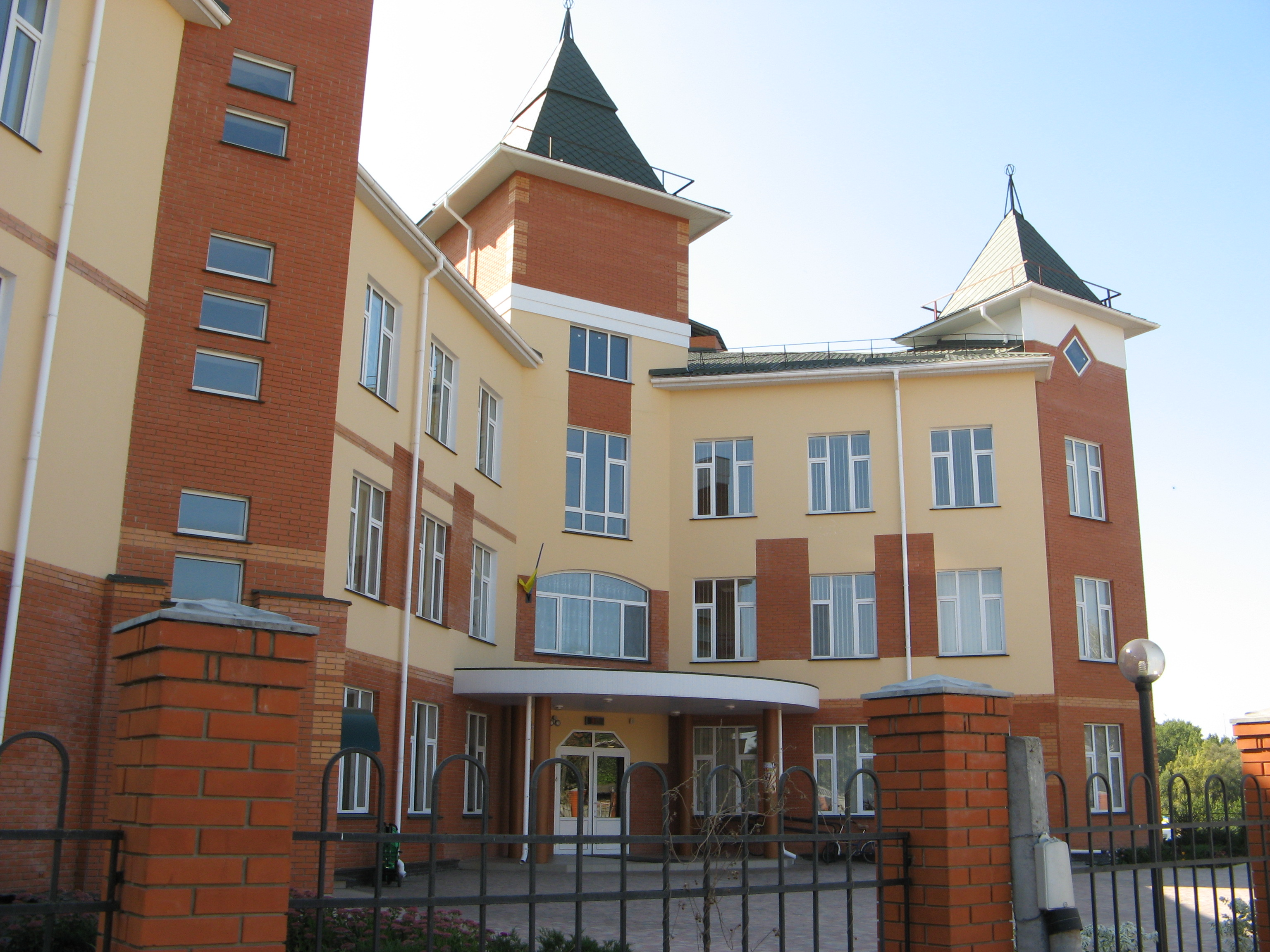 Нова школа у Конотопі